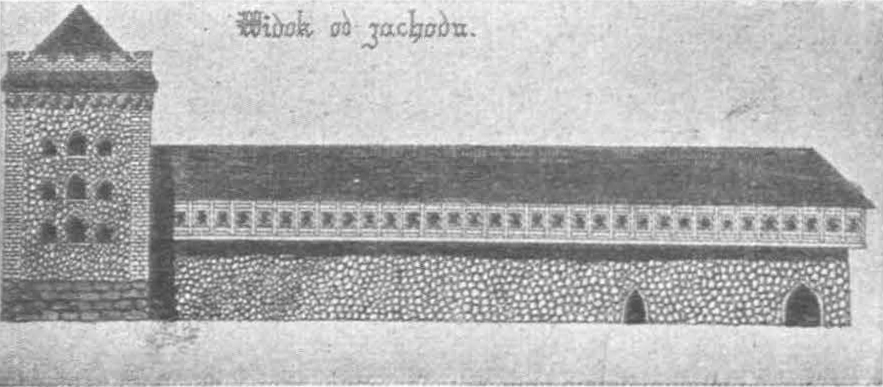 Беларуская (тарашкевіца): Крэва (Kreva). Замак, рэканструкцыя